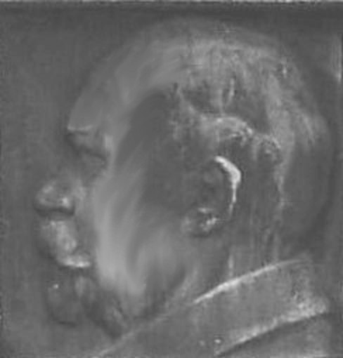 Ausschnitt des Porträts auf dem Grab von Wilhelm Blos auf dem Pragfriedhof Stuttgart